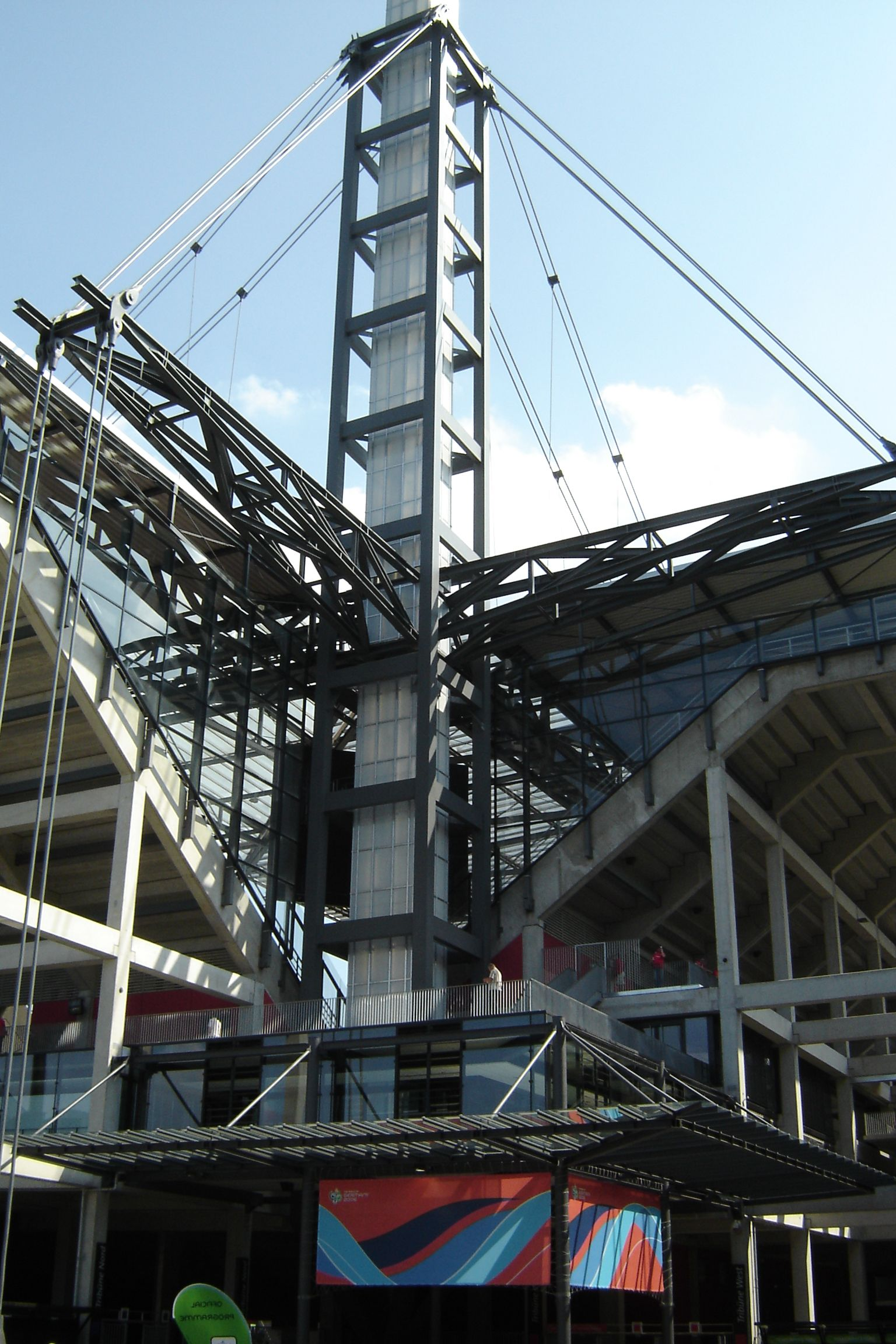 Jeden ze čtiř dominantních sloupů stadionu v Kolíně nad Rýnem - Köln Stadion (Rhein Energie Arena) Autor : Wikipedista: Koky.